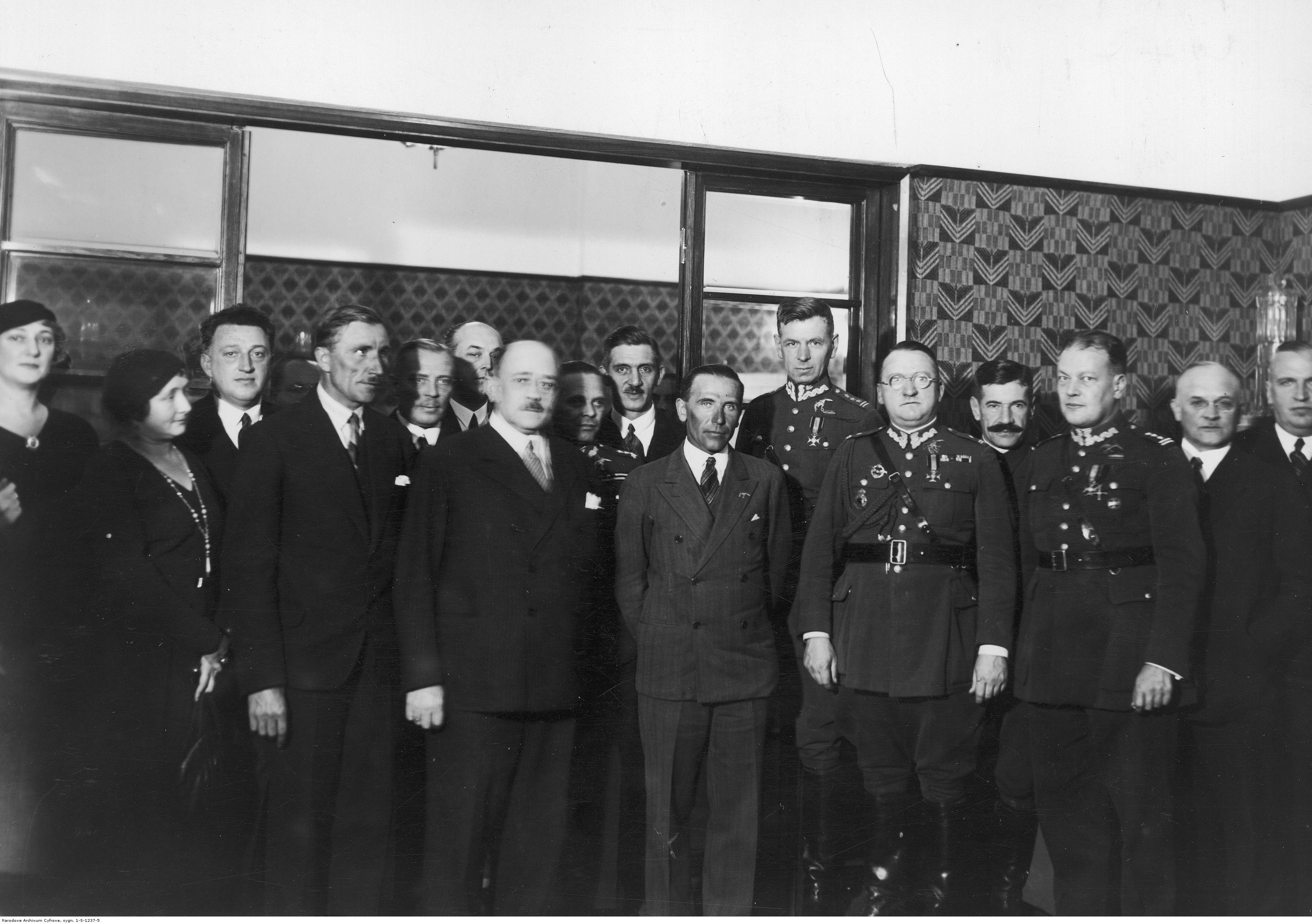 Rajd lotniczy kapitana Stanisława Karpińskiego i Wiktora Rogalskiego nad Azją Mniejszą. Kapitan Stanisław Karpiński (4. z prawej na pierwszym planie) oraz jego mechanik Wiktor Rogalski (6. z prawej na pierwszym planie) podczas uroczystości w Aeroklubie Warszawskim. Widoczni także m.in.: sekretarz Aeroklubu RP major Bogdan Kwieciński (3. z prawej na pierwszym planie, w okularach), dyrektor Departamentu Lotnictwa w Ministerstwie Spraw Wojskowych pułkownik Ludomił Rayski (na lewo za mjr. Kwiecińskim), dyrektor Departamentu Lotnictwa w Ministerstwie Komunikacji Czesław Filipowicz (na lewo od płk. Rayskiego), poseł perski Assad Bahador (5. z prawej); październik 1932. Koncern Ilustrowany Kurier Codzienny - Archiwum Ilustracji. Sygnatura: 1-S-1237-5